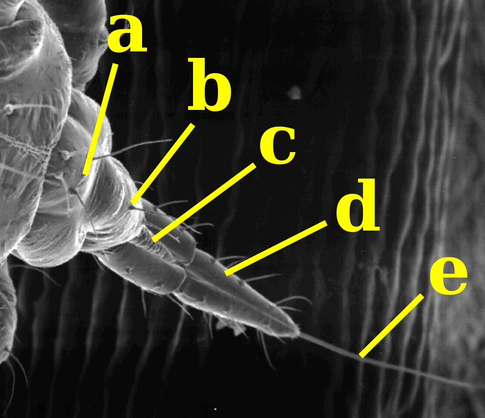 see legend below